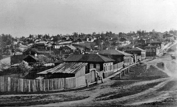 г. Иркутск. Глазковское предместье